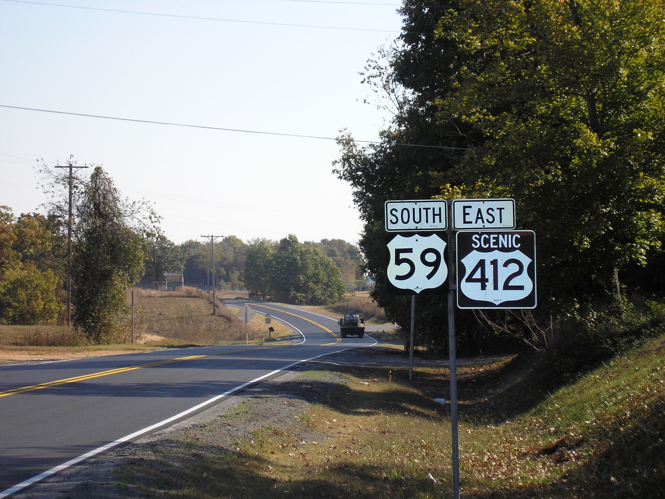 Scenic US 412 in Kansas, Oklahoma